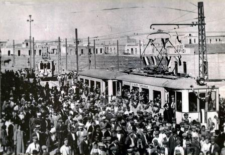 Torremaggiore, seconda inaugurazione del tram per San Severo